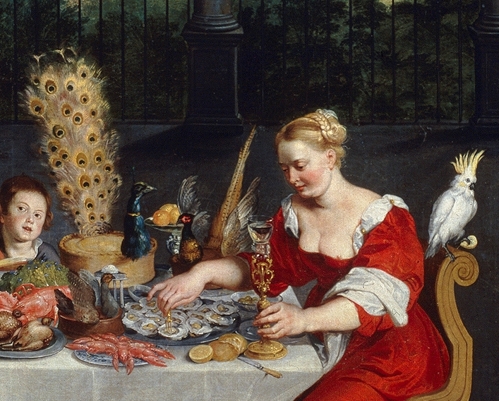 detail